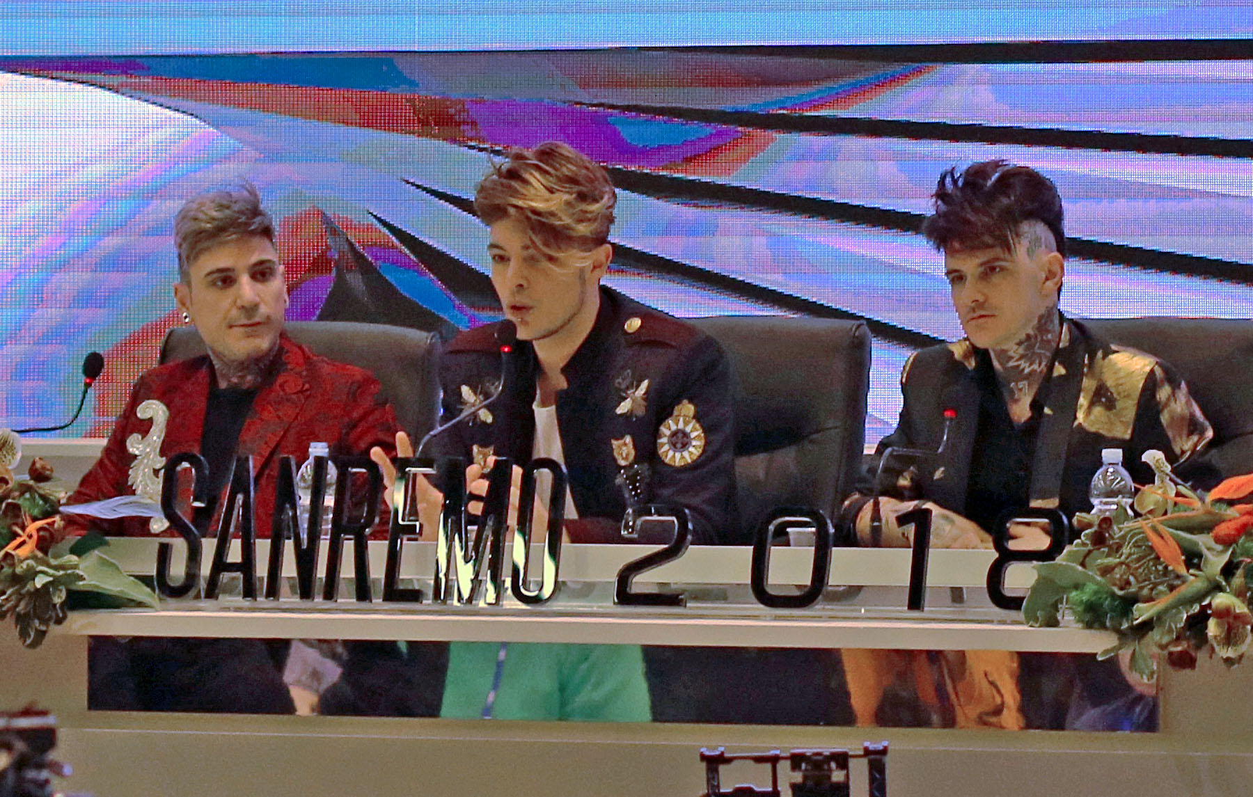 Il gruppo musicale italiano The Kolors in conferenza stampa al Festival di Sanremo 2018.